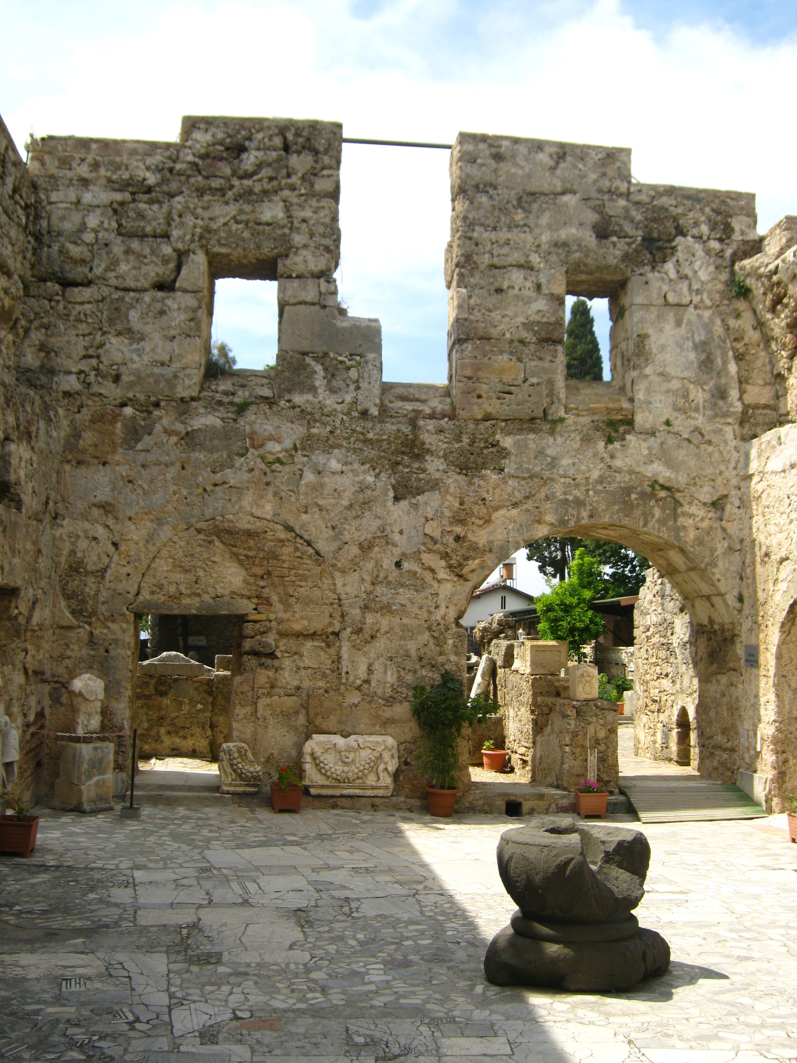 Ринкова терма. Зала фрігідрарію